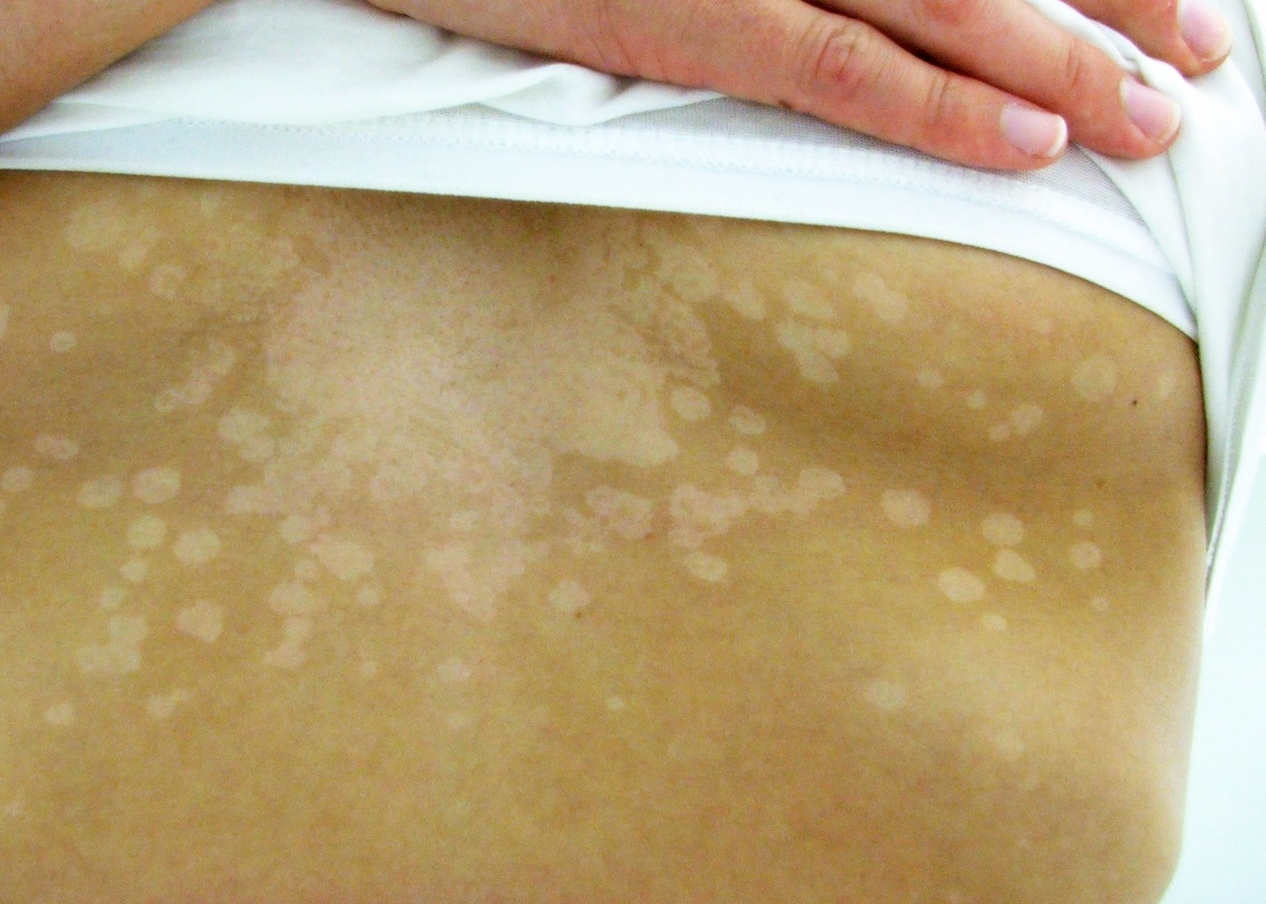 Tinea versicolor en el abdomen de una dama